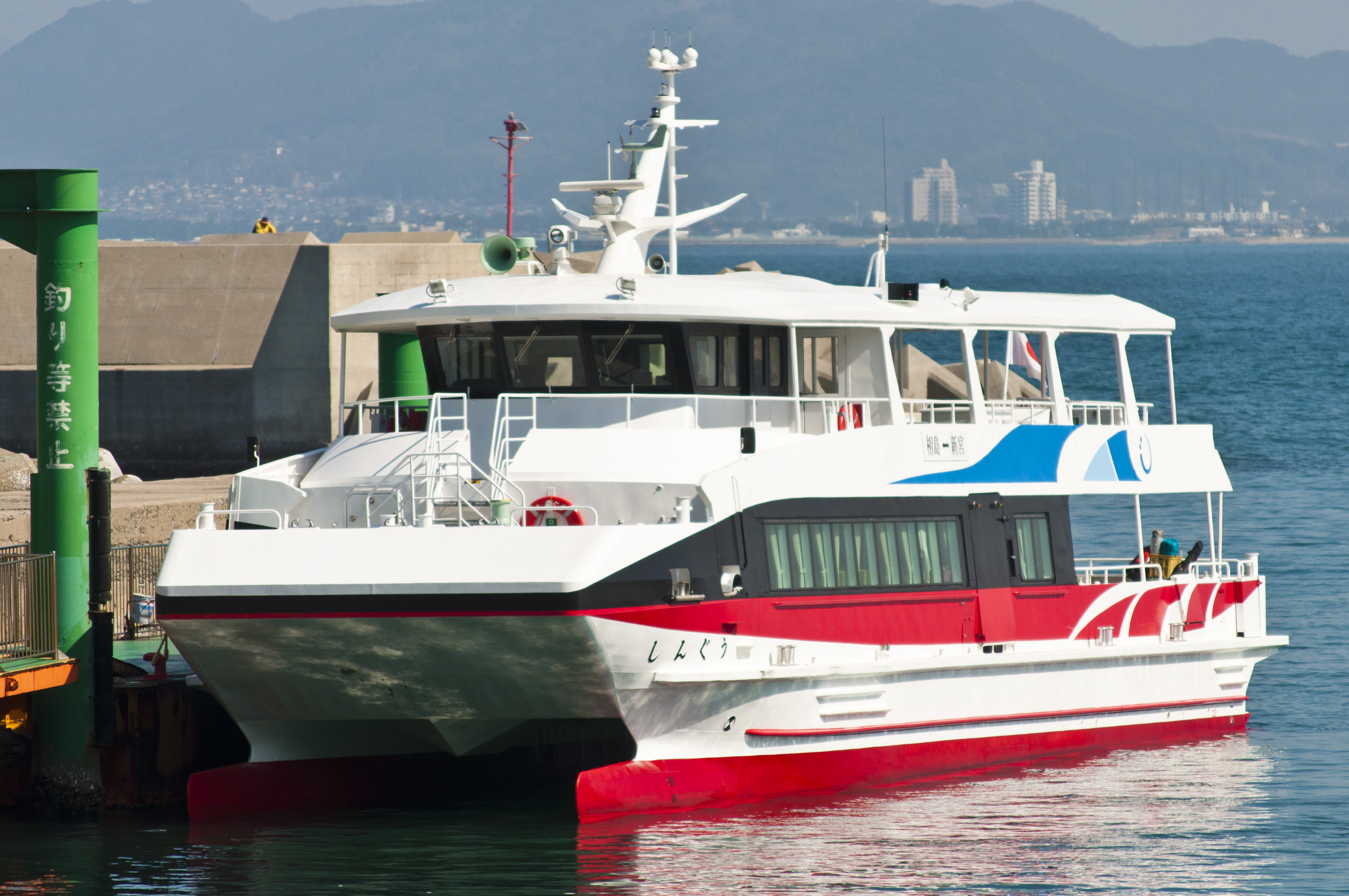 新宮町営渡船「しんぐう」。新宮⇔相島航路に就航している。投稿者が新宮漁港で撮影